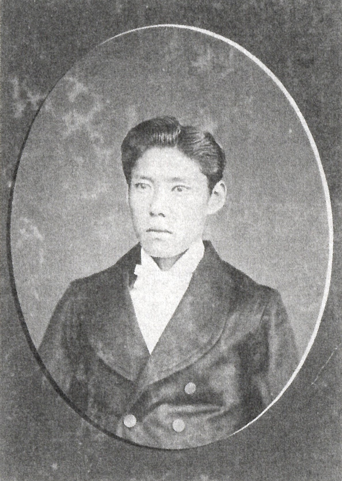 植村家壷の肖像写真。